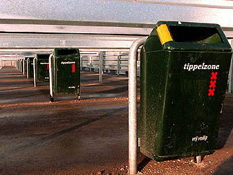 Prullenbakjes op de (gesloten) tippelzone in Amsterdam.